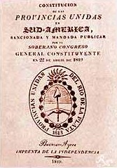 Constitución Argentina de 1819. Fue promulgada en Buenos Aires, rechazada por las demás provincias, y derogada en 1820